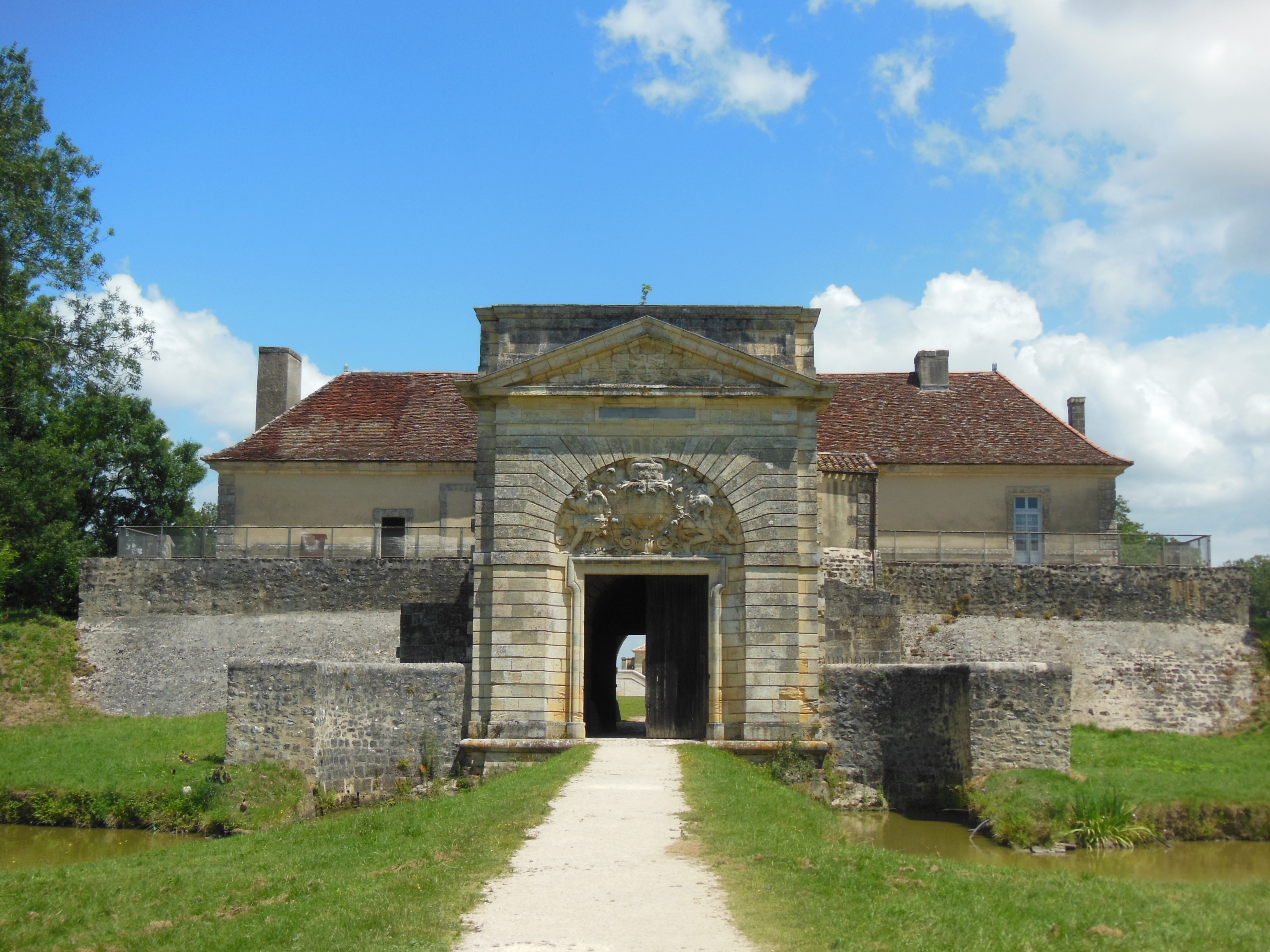 Corps de garde royal du Fort Médoc